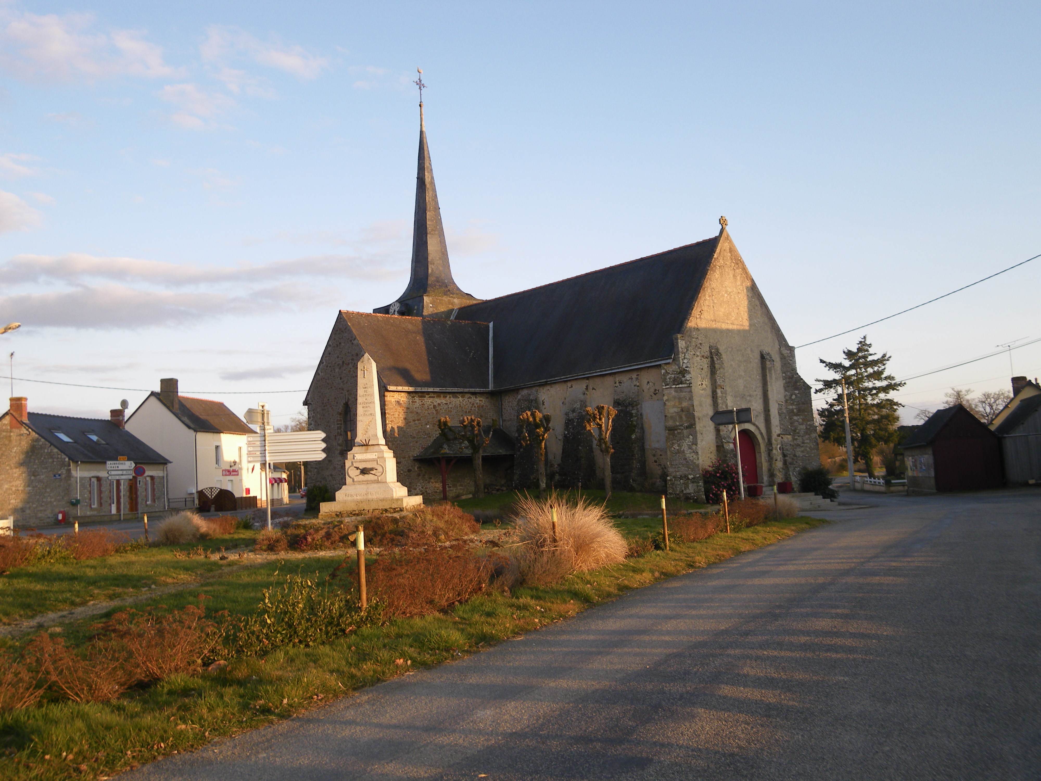 l'eglise de gastines